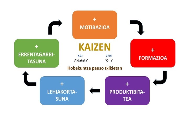 Kaizen metodologia